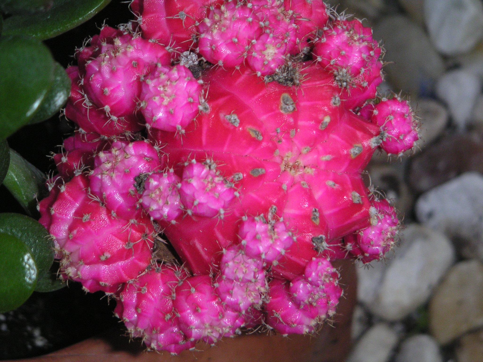 Succulent plant.